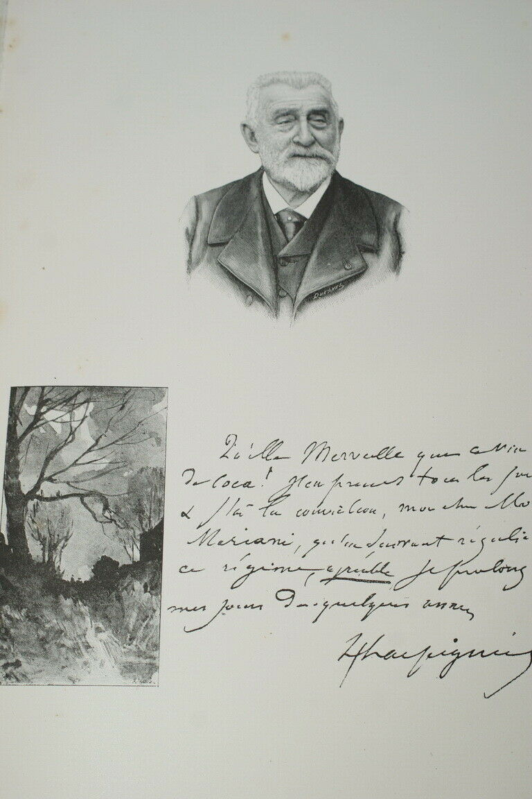 French painter Henri Harpignies (1819-1916)